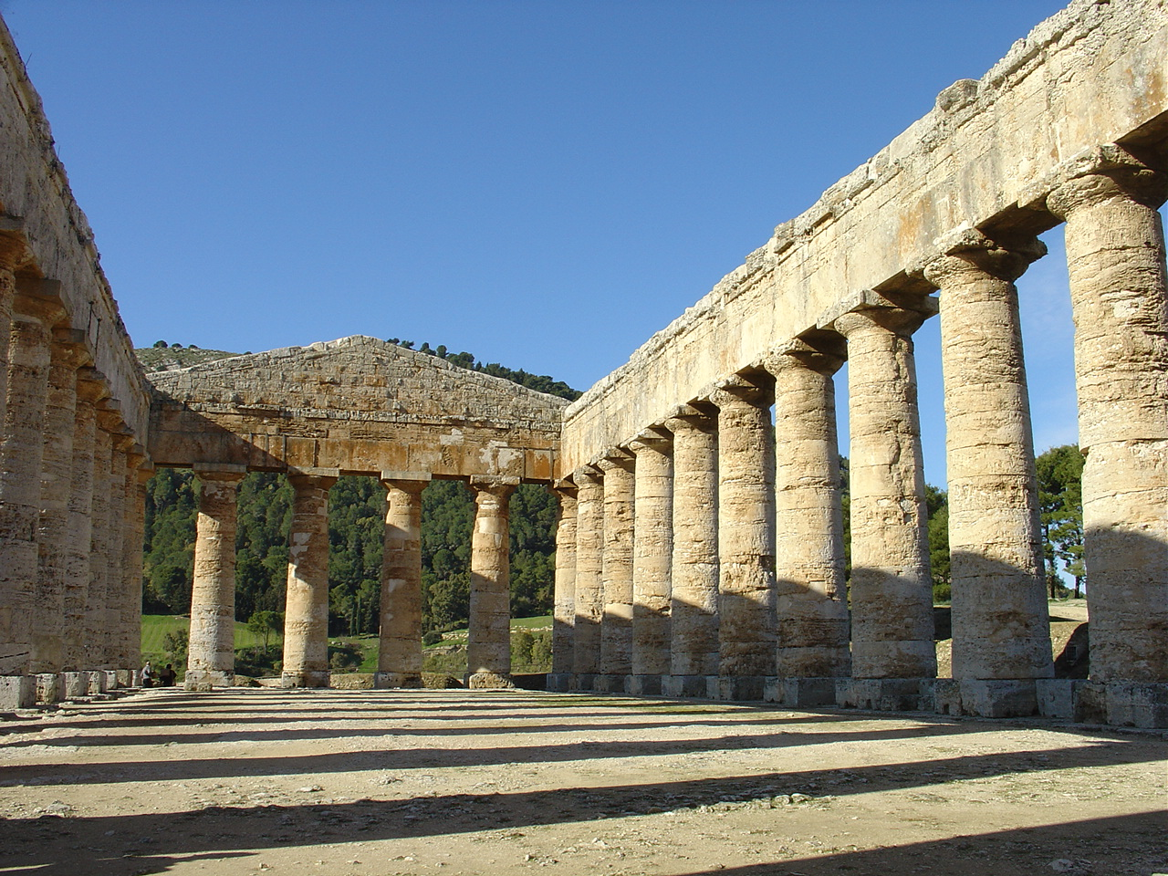 Segesta (Trapani, Sicilia), Tempio greco